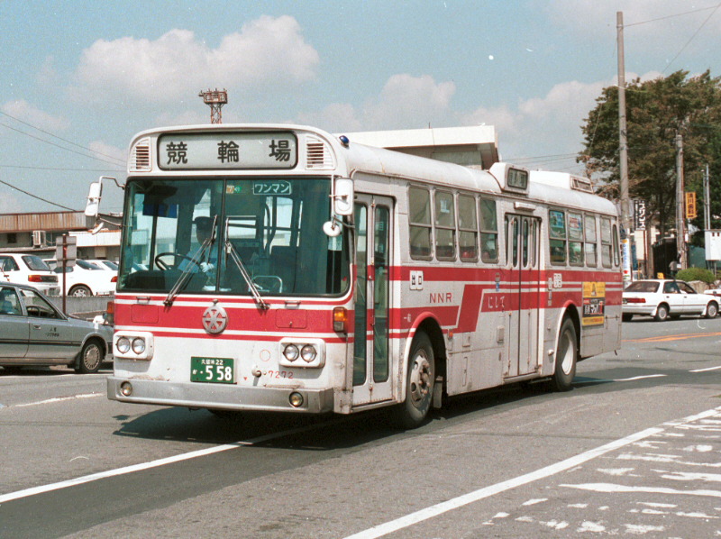 JR久留米駅前にて撮影